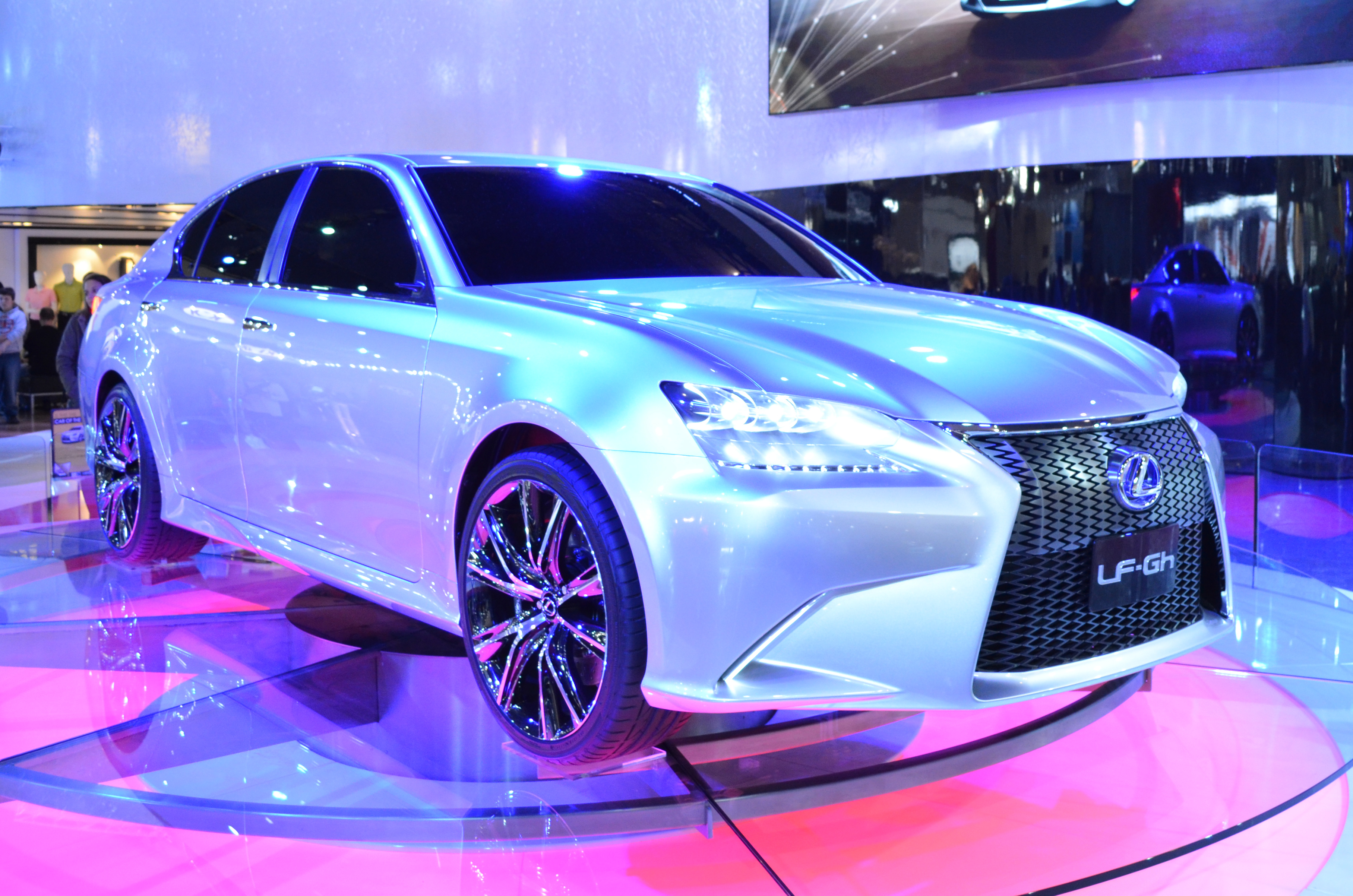 20110709_D5100 (377)